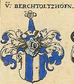 Wappen der Berchtoltzhofener (Beroltzhofen)